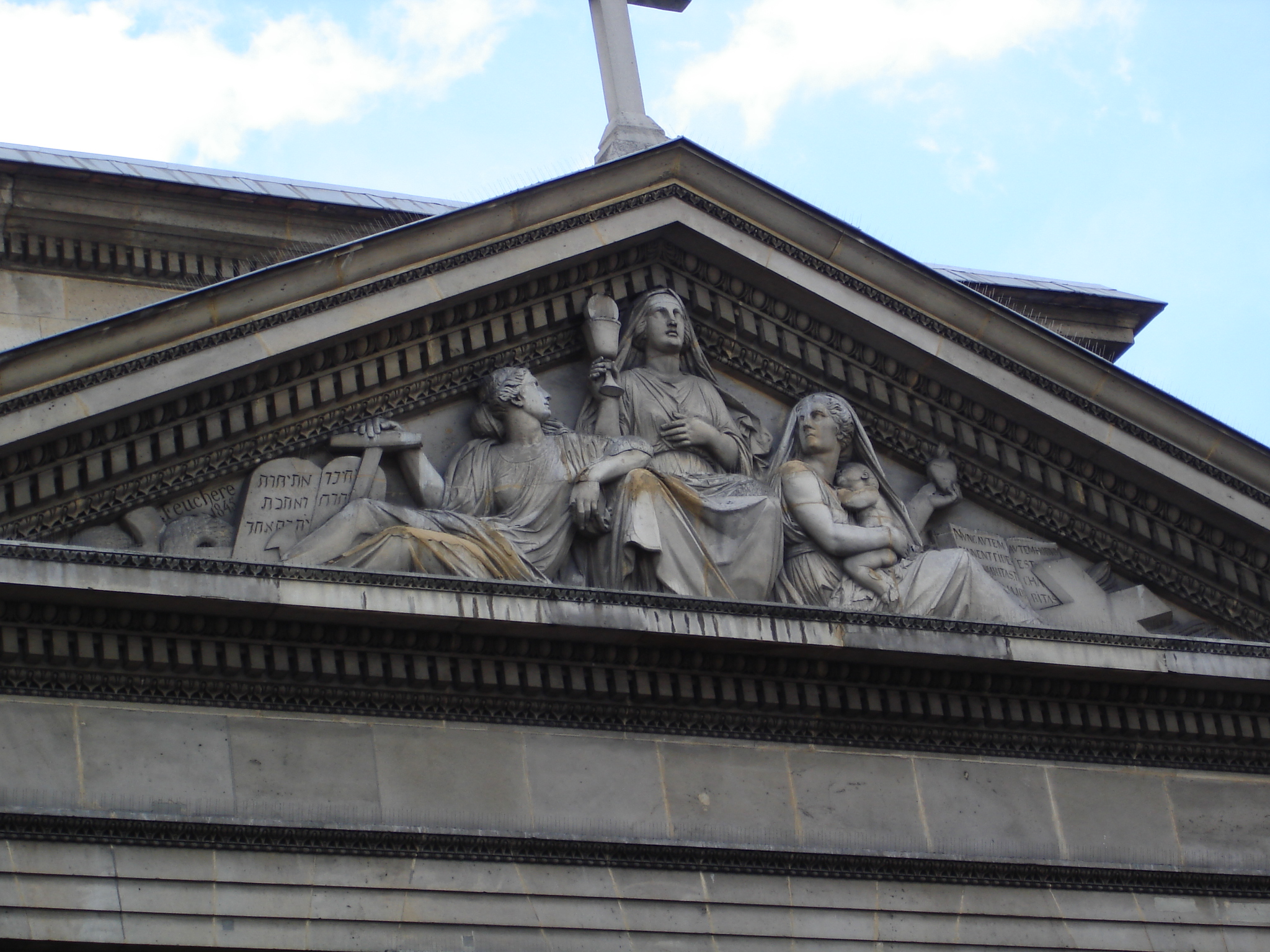 Église Saint-Denys-du-Saint-Sacrement, rue de Turenne in Paris- Fronton